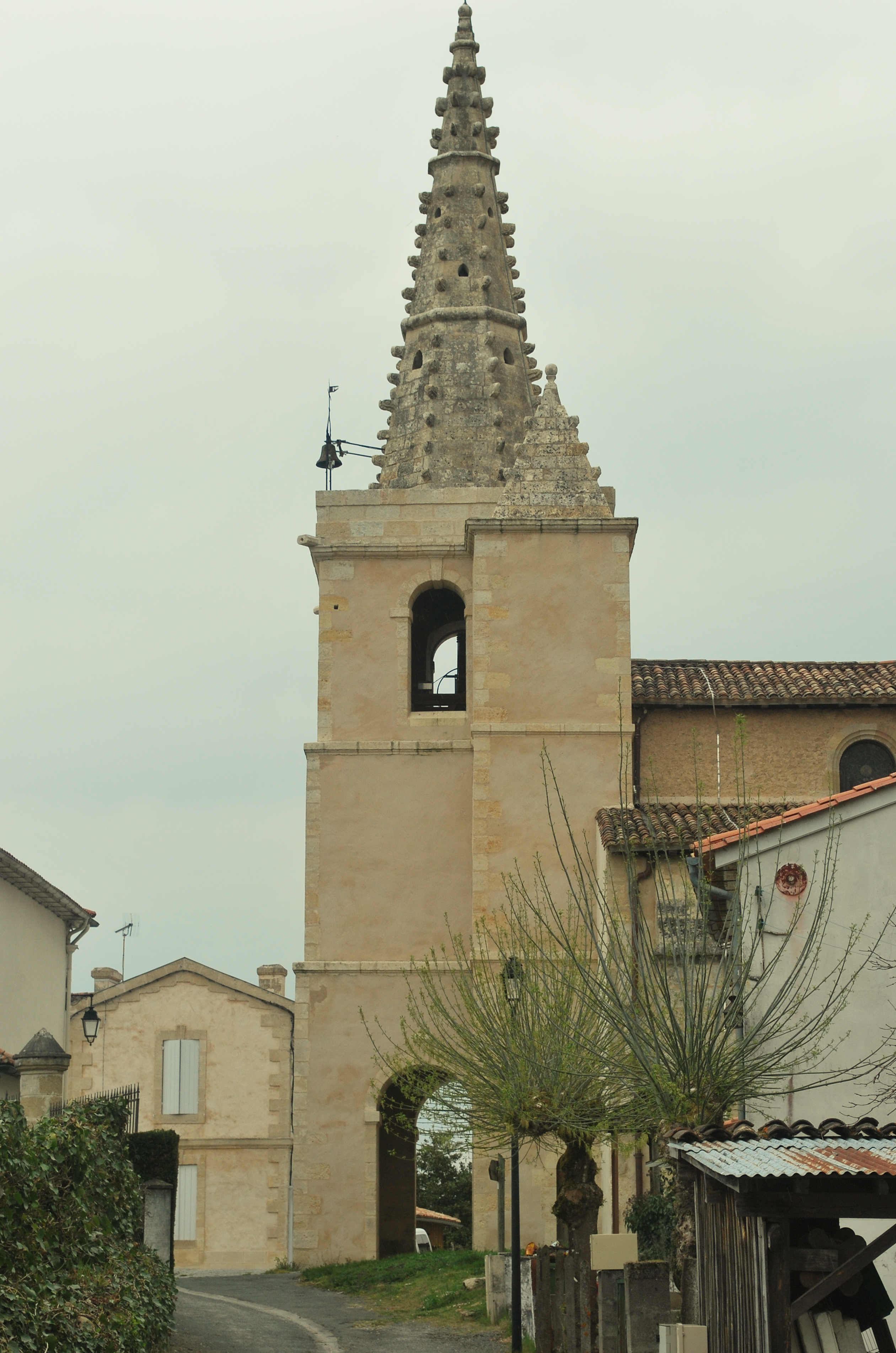 Glèisa de Sent Miquèu de Riufred despuish lo riu.